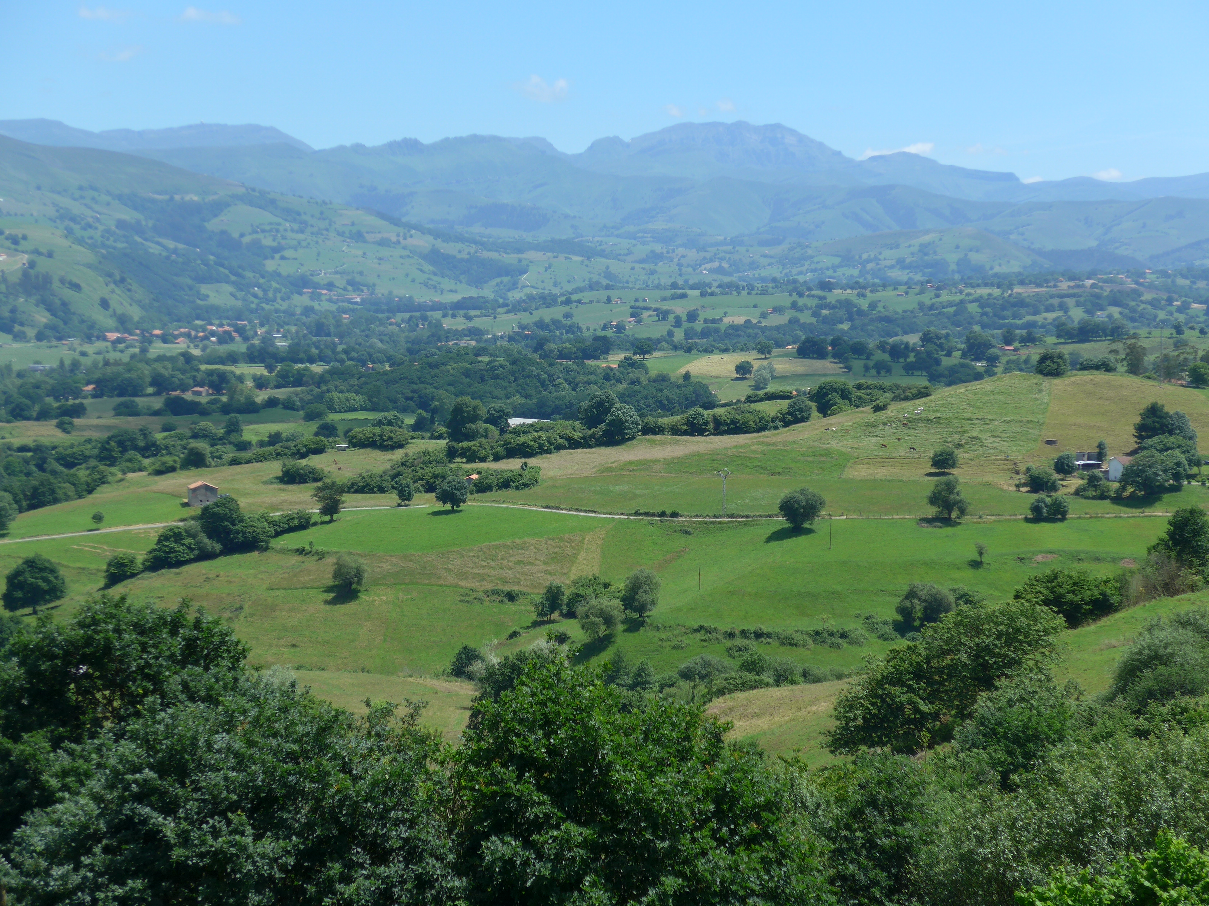 El Castro Valnera (1718 m) es la máxima elevación de las montañas pasiegas.